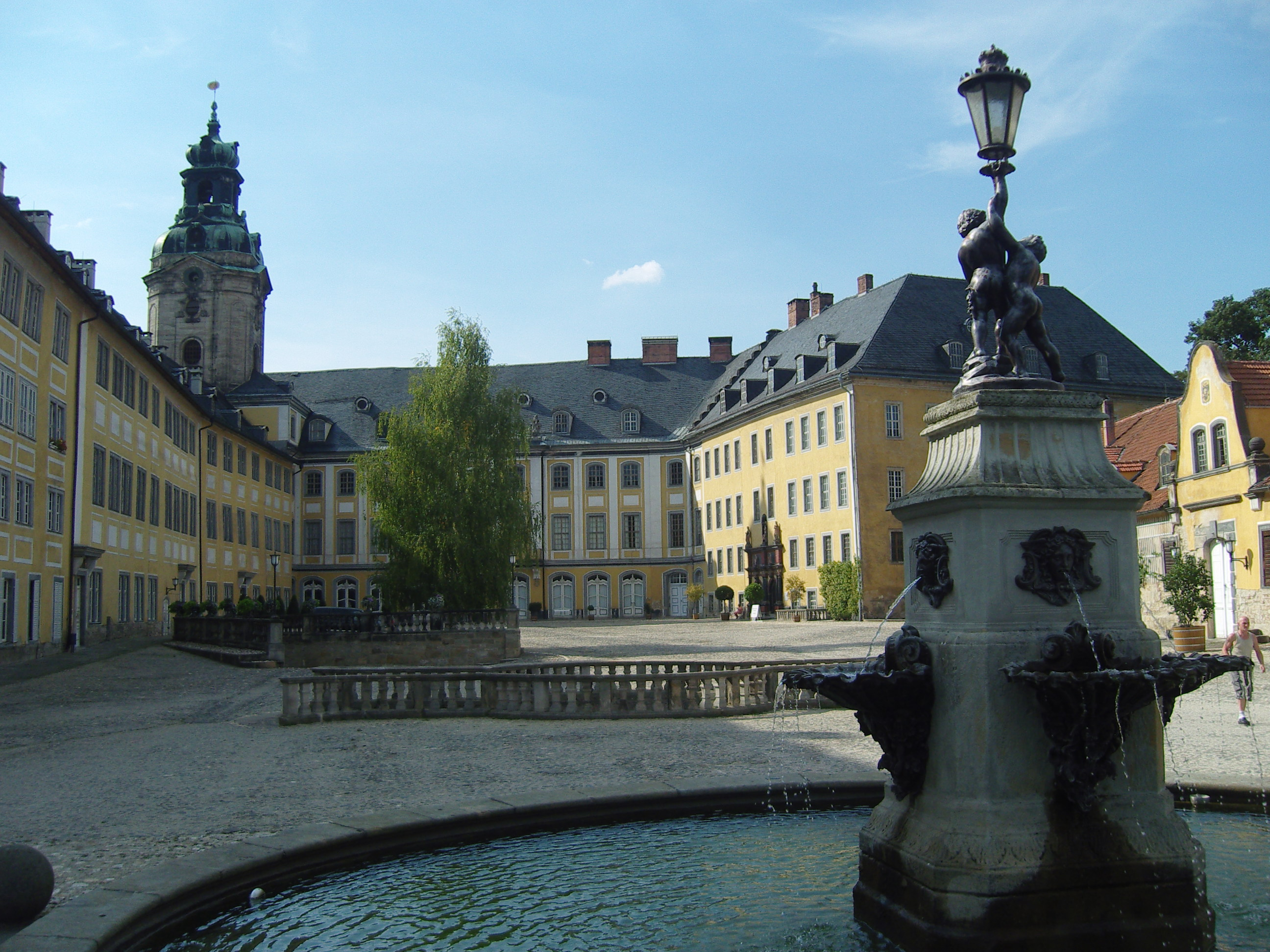 Innenhof Schloss Heidecksburg Rudolstadt